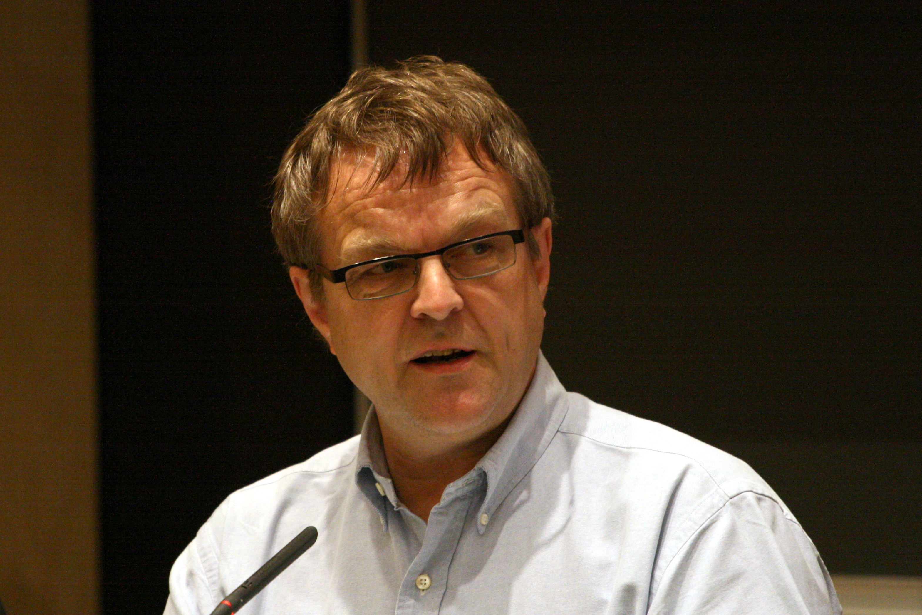 Olav Torvund under en fildelingsdebatt ved Universitetet i Oslo 23. april 2009.